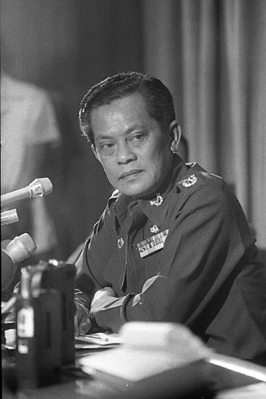 General Kriangsak Chomanan (Chamanand) in 1976, by Norman Peagam